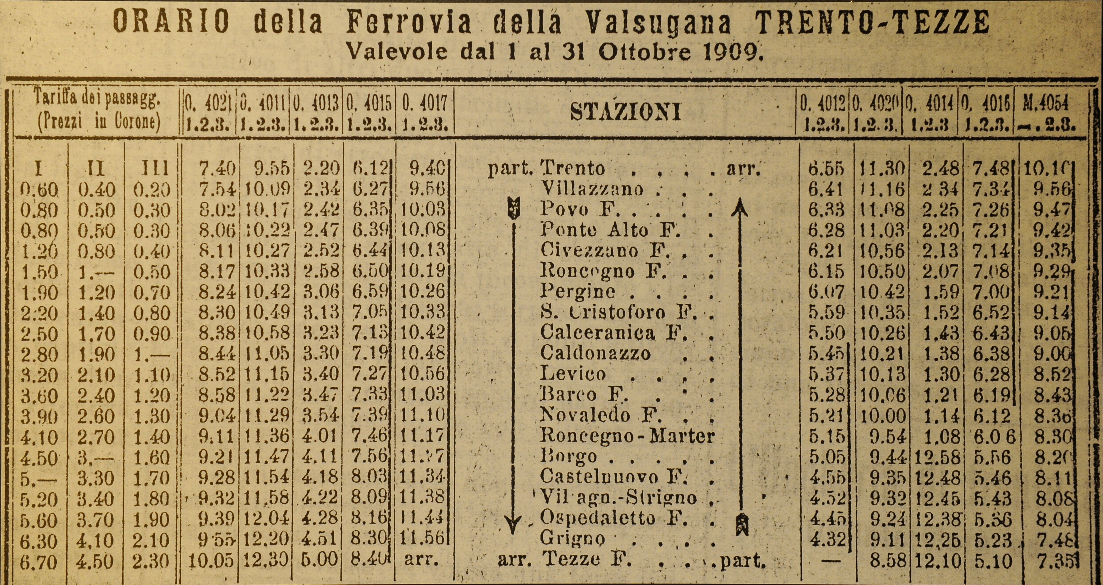 Orario della Ferrovia della Valsugana Trento-Tezze. Valevole dal 1 al 31 Ottobre 1909. Museo Casa De Gasperi, Pieve Tesino.